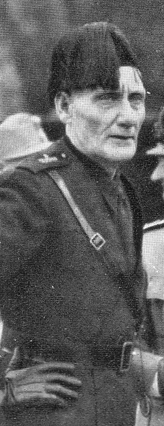 Pompeo Aloisi